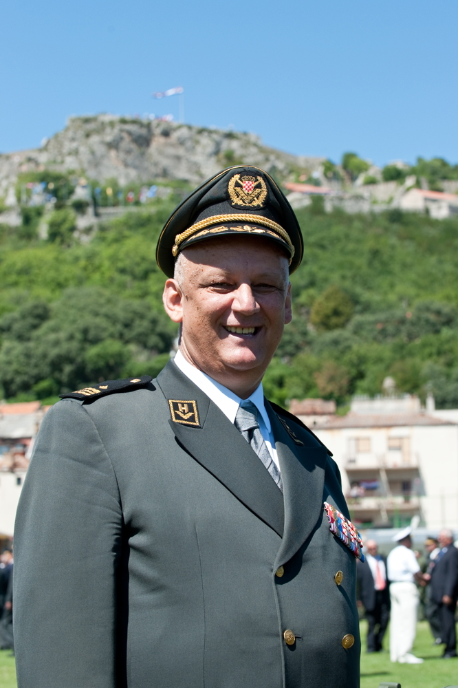 16. obljetnica vojnoredarstvene operacije Oluja u Kninu